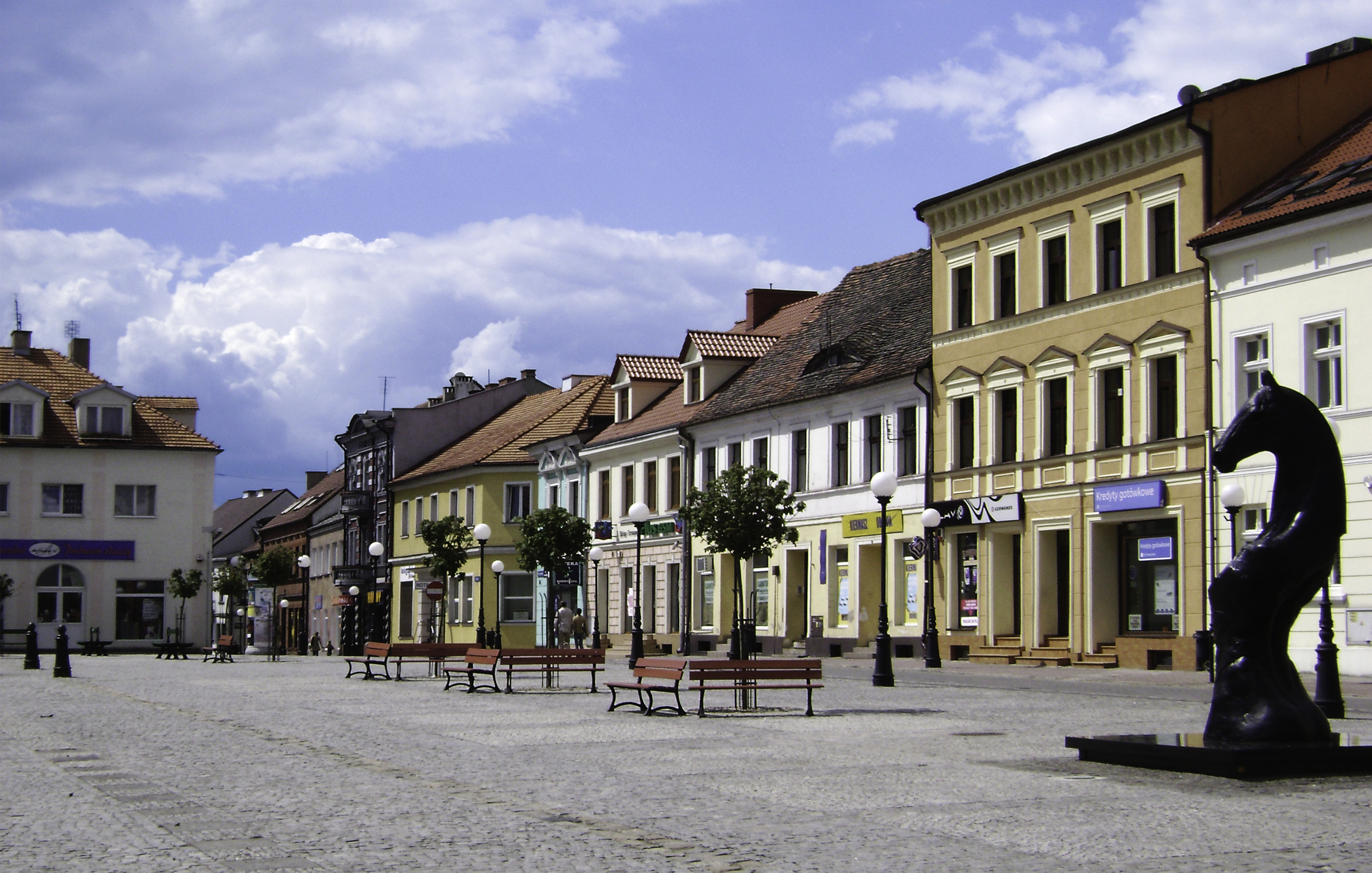 Rynek w Koninie